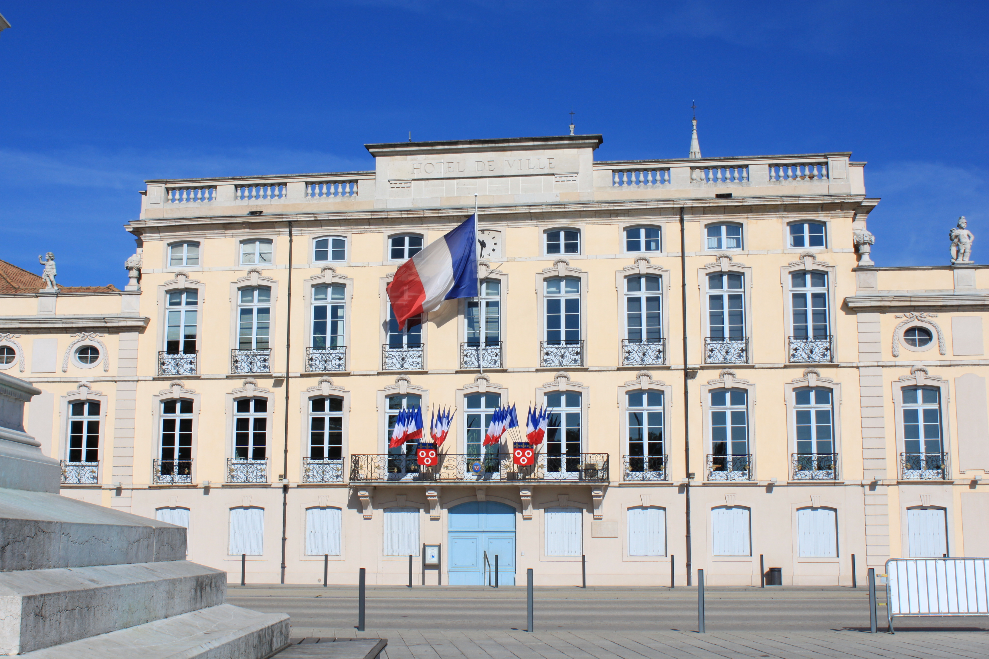 Mâcon, Saône-et-Loire, Bourgogne, France